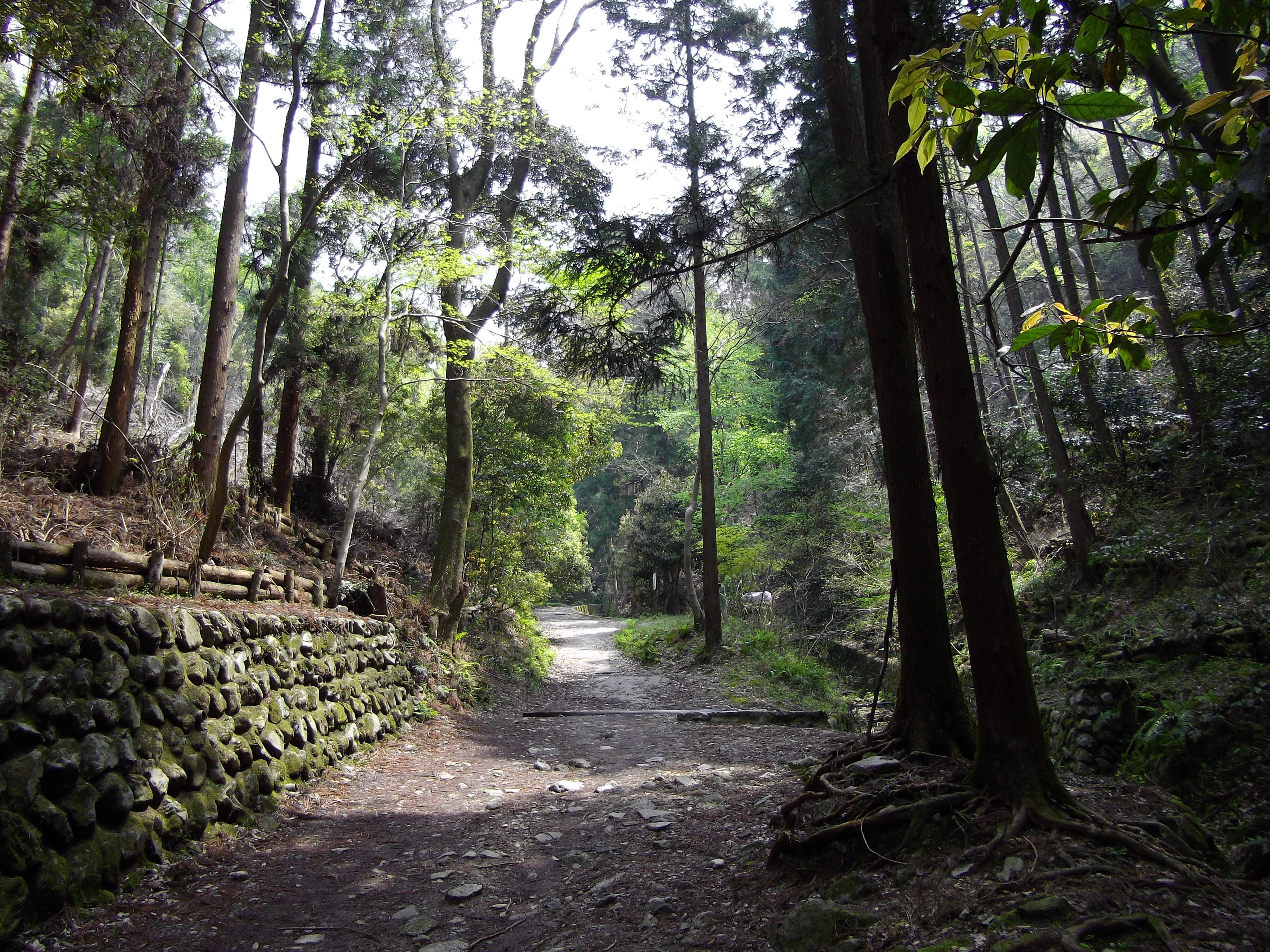 大文字山、銀閣寺北からの登山道。かなり下の方。